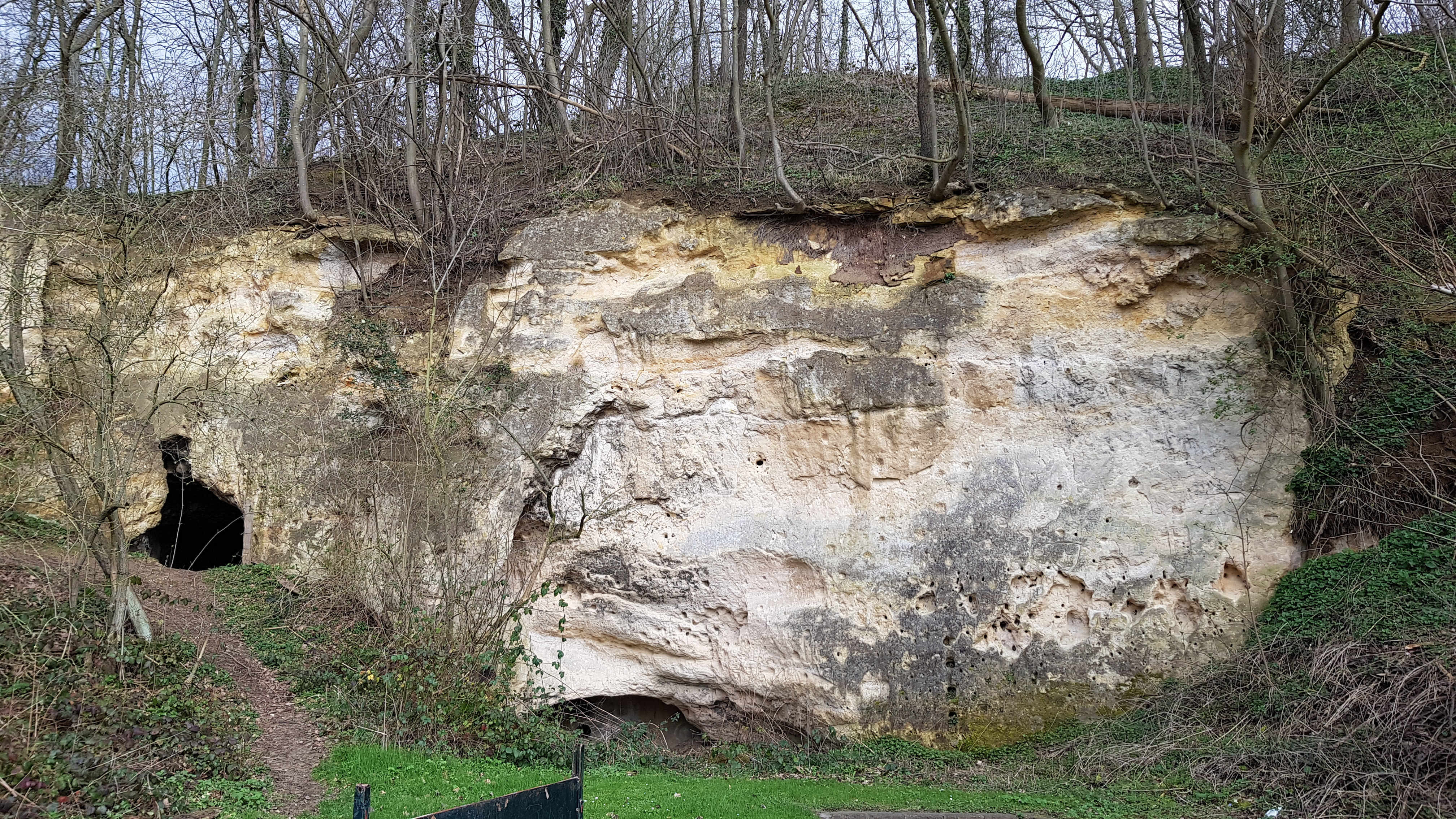 Keerderberggroeve, Cadier en Keer, Nederland